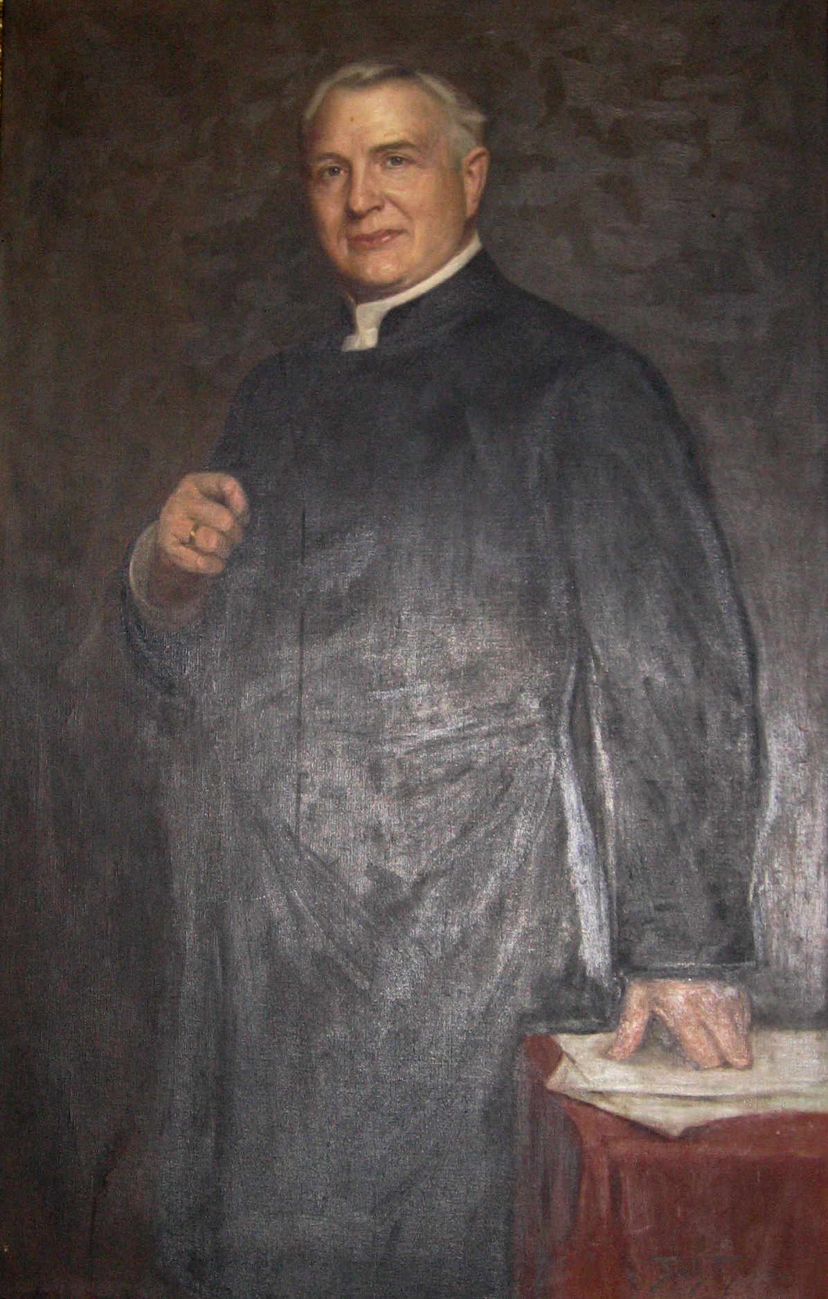 Gemälde von Frederic Vezin (1859–1933) im Auftrag Kaiser Wilhelm II. Dargestellte Person : Prof. Dr. Hans Schöttler , Generalsuperintendent von Ostpreussen und letzter Hofprediger des Kaisers.